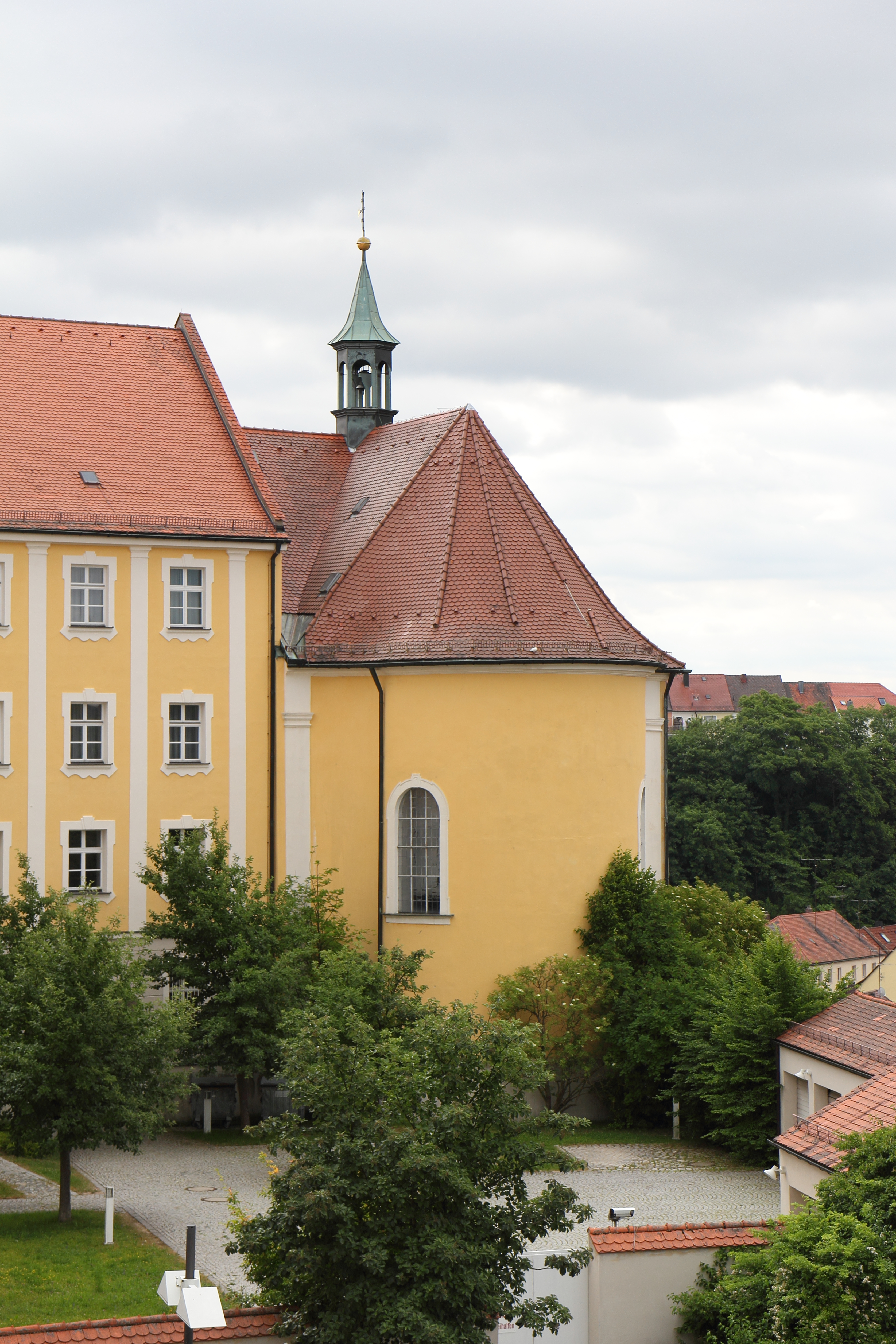 Sulzbach-Rosenberg - Klostergasse 2; Luitpoldplatz 13 - Ehem. Salesianerinnenkloster mit Klosterkirche St. Hedwig. Äußerer und innerer Flügel 1753-55, äußerer Flügel 1850 um ein Geschoß erhöht, Klosterkirche St. Hedwig 1762-65; anstelle des früheren Ballhauses des Schlosses errichtet.